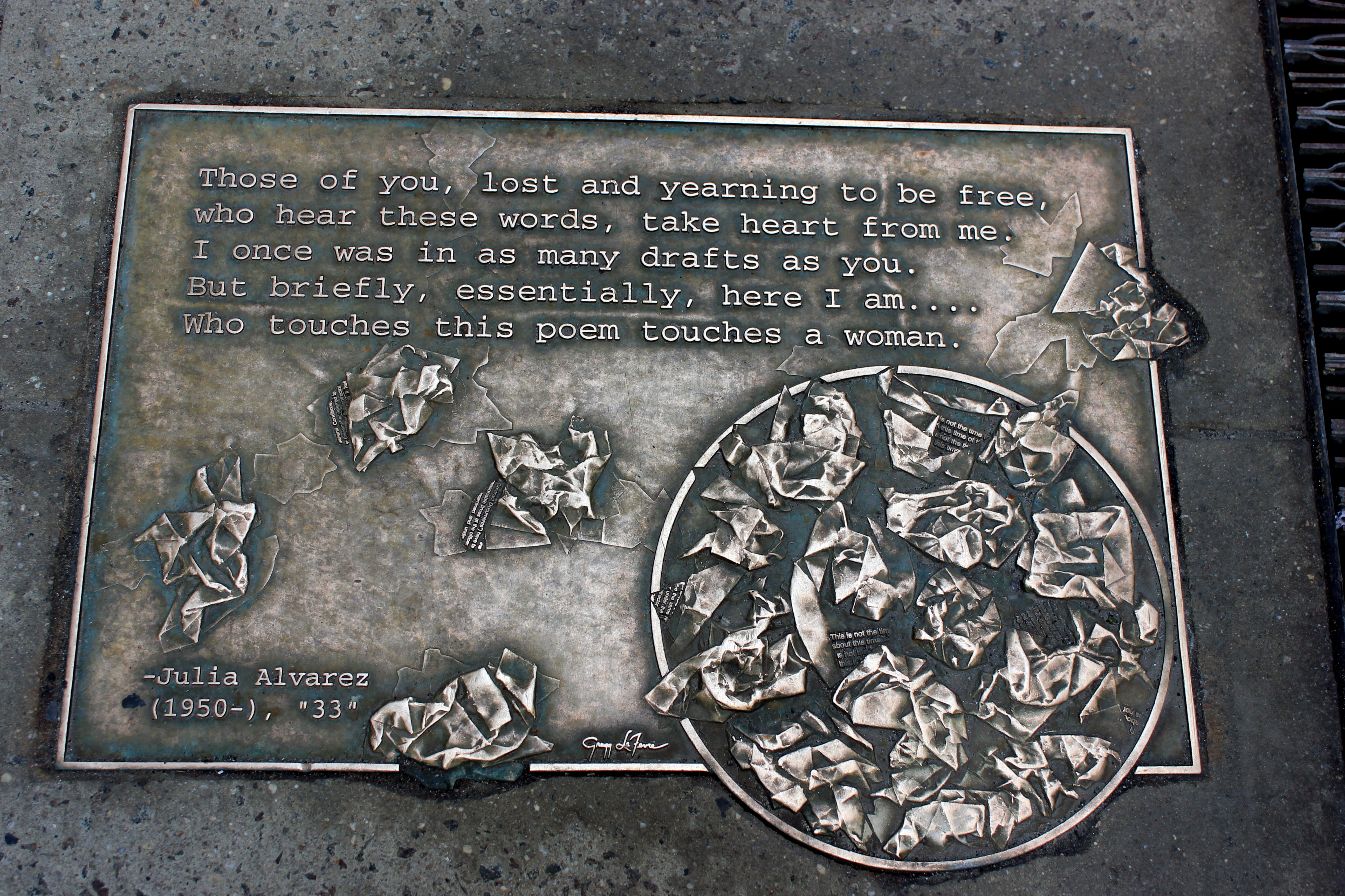 Library Walk New York City